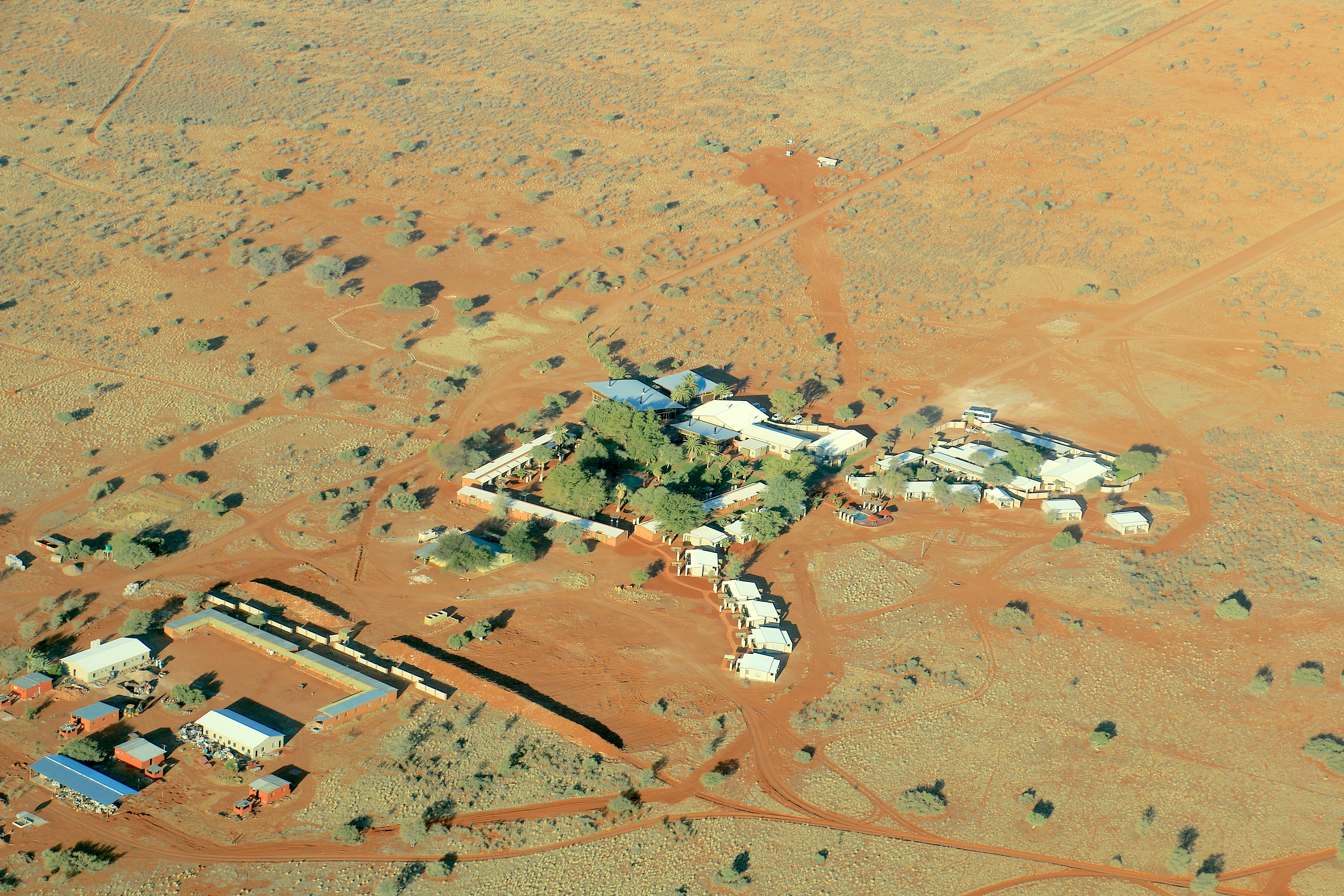 Anib Lodge Namibia